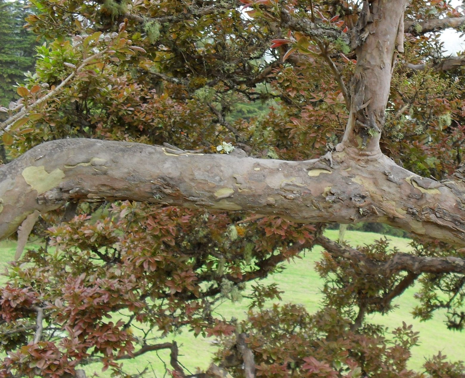 Corteza de Myrcianthes leucoxyla, con la corteza delgada y característica en descamación continua